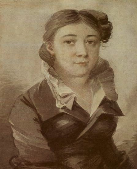 Наталья Дмитриевна Оболенская (ум. 1843), дочь Д. А. Волконского, с 1819 года замужем за подполковником Н. П. Оболенским.